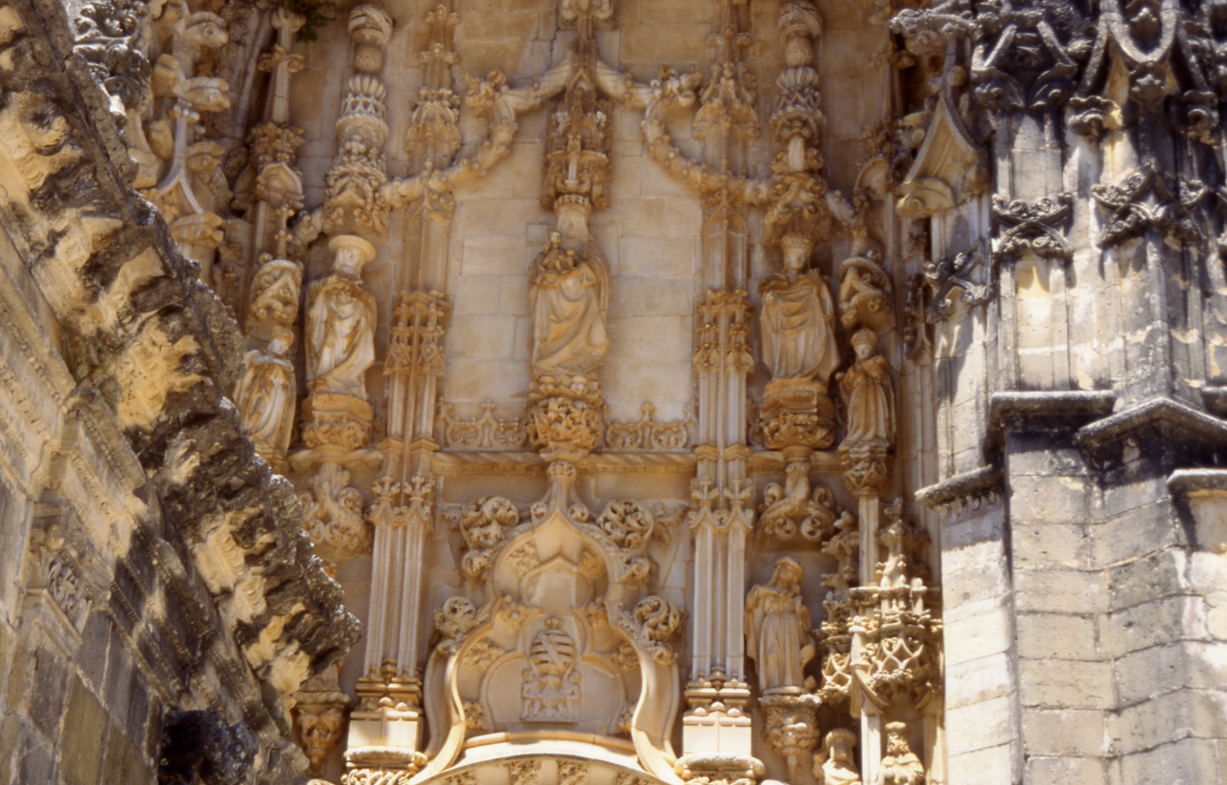 Tomar / Convento de Cristo Innen